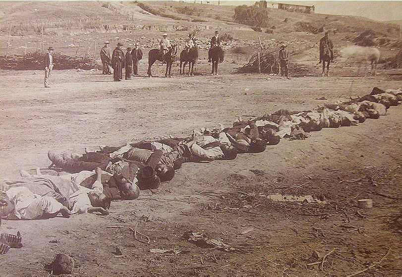 La Batalla de Placilla fue la última batalla de la Guerra Civil de 1891 fue librada en las afueras del puerto chileno de Valparaíso, el 28 de agosto de 1891. En ella se enfrentaron las fuerzas del ejército revolucionario congresista, de 11.000 hombres, al mando del coronel Estanislao del Canto, y las tropas leales al gobierno del presidente José Manuel Balmaceda, con 9.500 efectivos, al mando de los generales Orozimbo Barbosa y José Miguel Alcérreca.